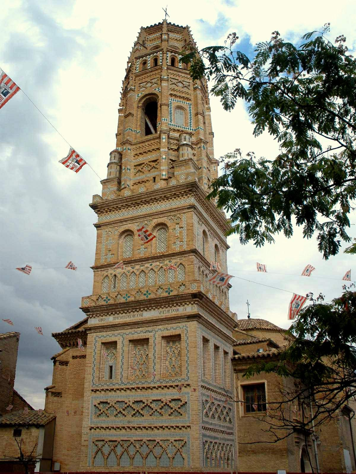 Iglesia de Nuestra Señora de la Asunción (Santa María), Utebo (Zaragoza)